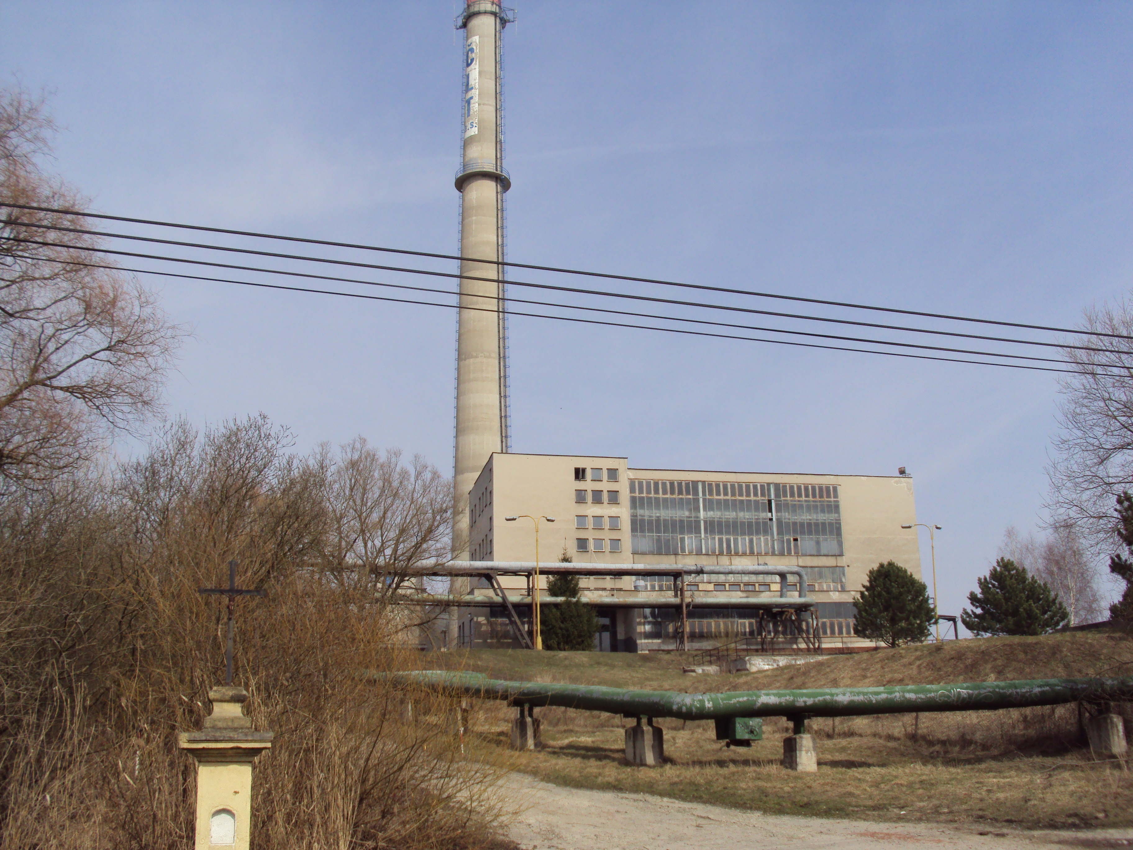 Česky: Teplárna ve Staré Lípě, součást České Lípy